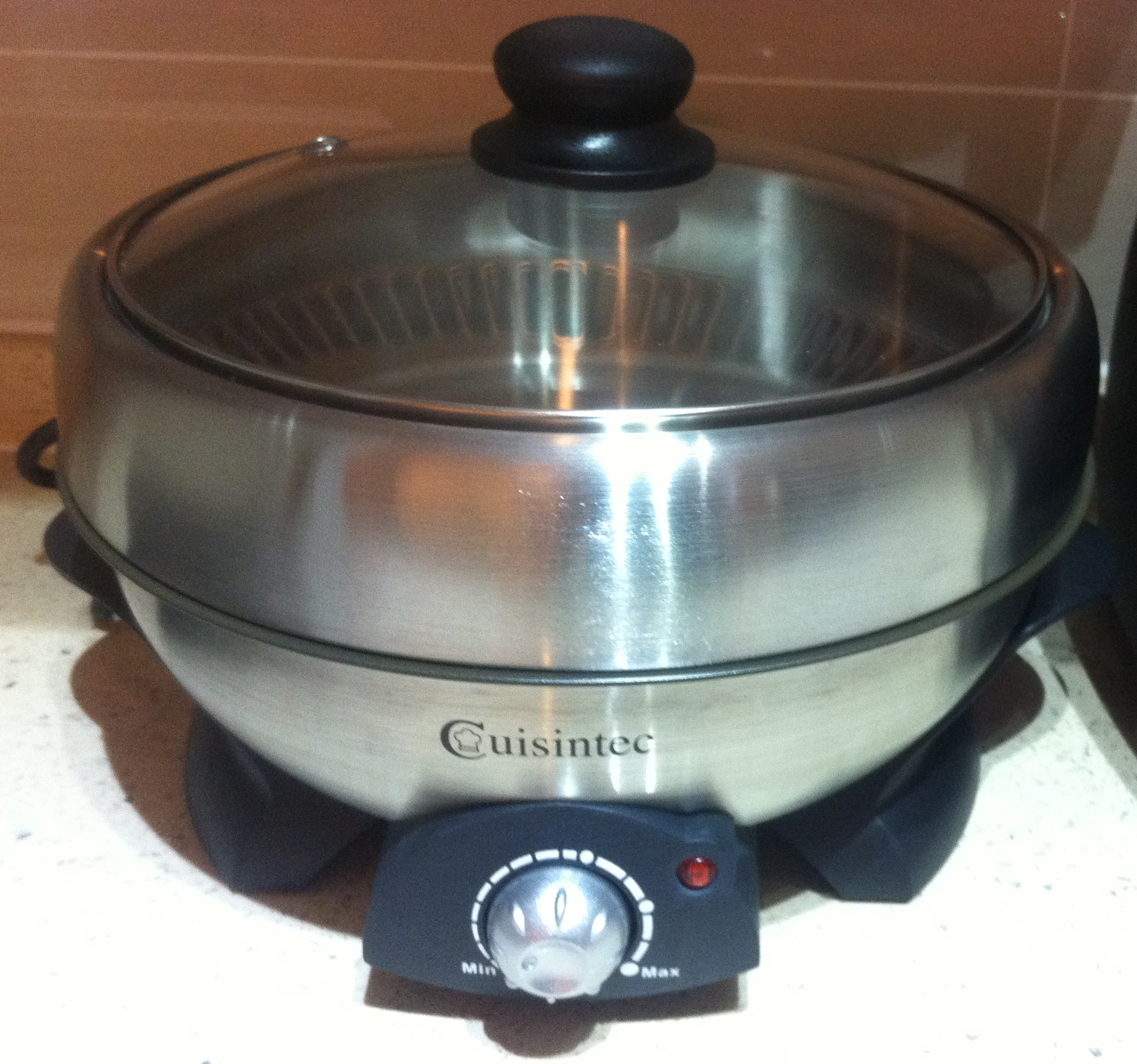 中文（香港）: Cuisintec多用途電飯煲